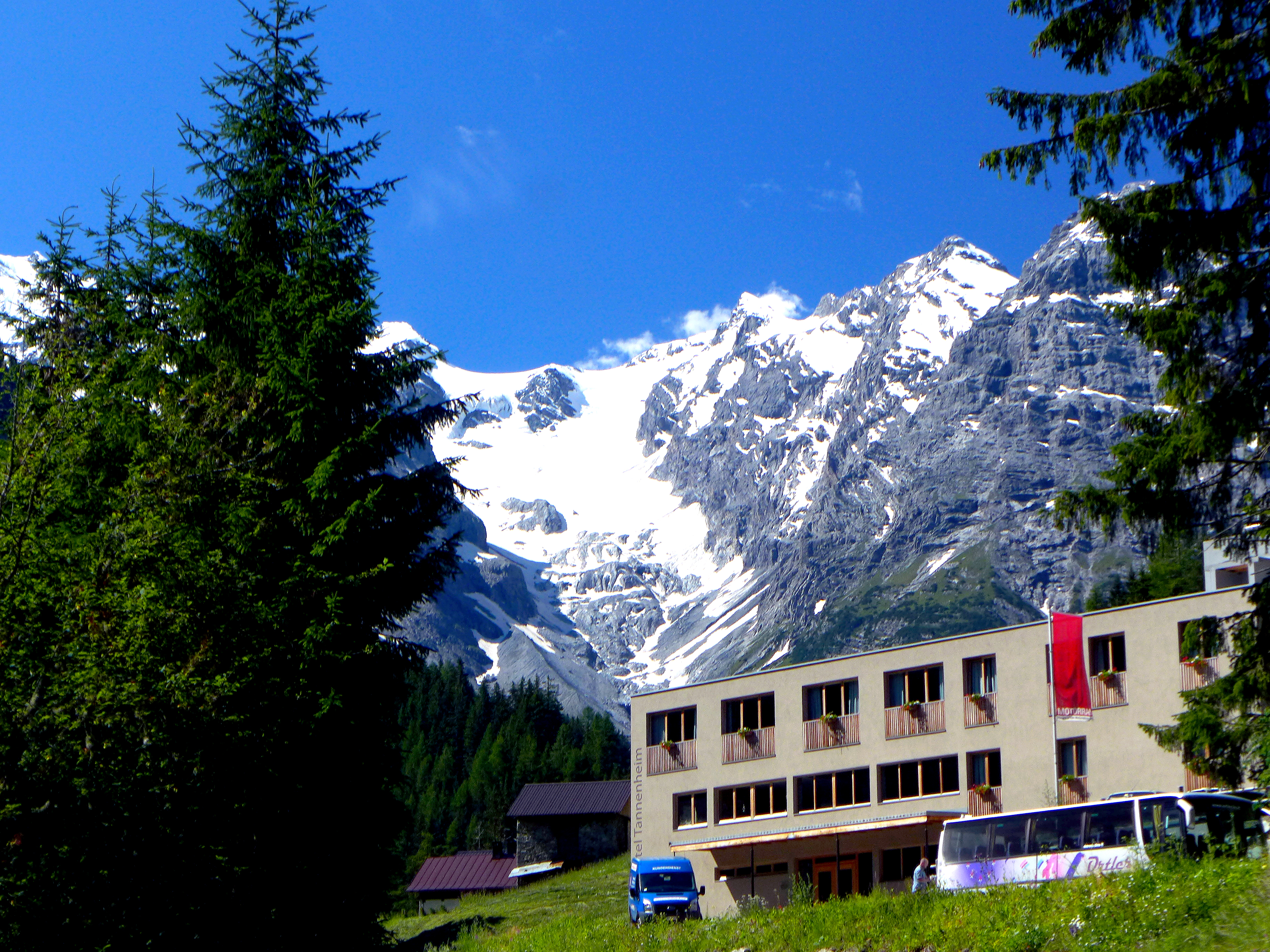 Stelvio-hágó (Prad am Stilfserjoch, Olaszország)